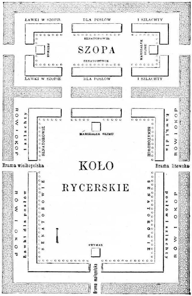 Ilustracja do „Encyklopedji staropolskiej ilustrowanej” Zygmunta Glogera.